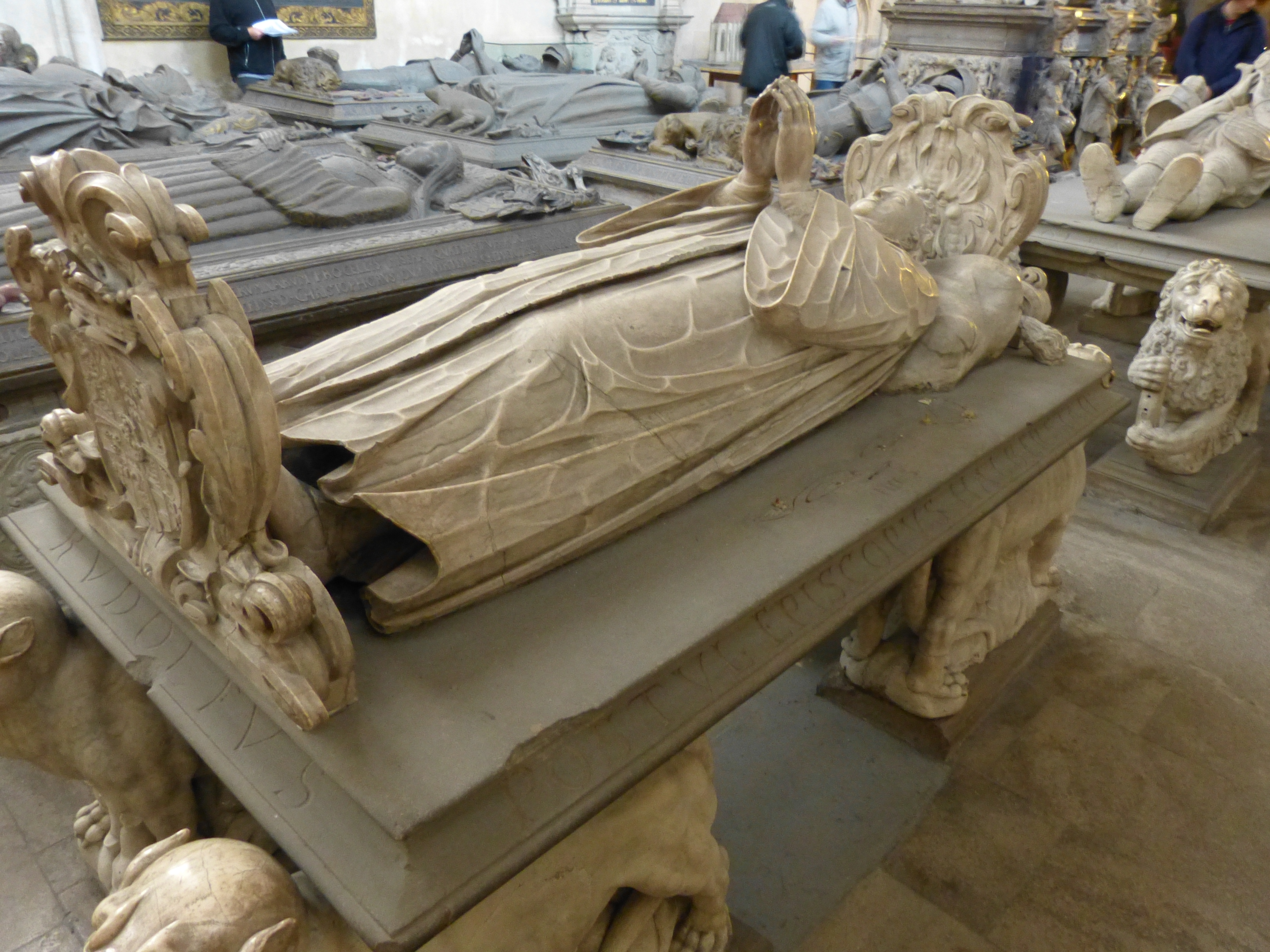 Grablege in der Stiftskirche von Tübingen, Baden-Württembergl